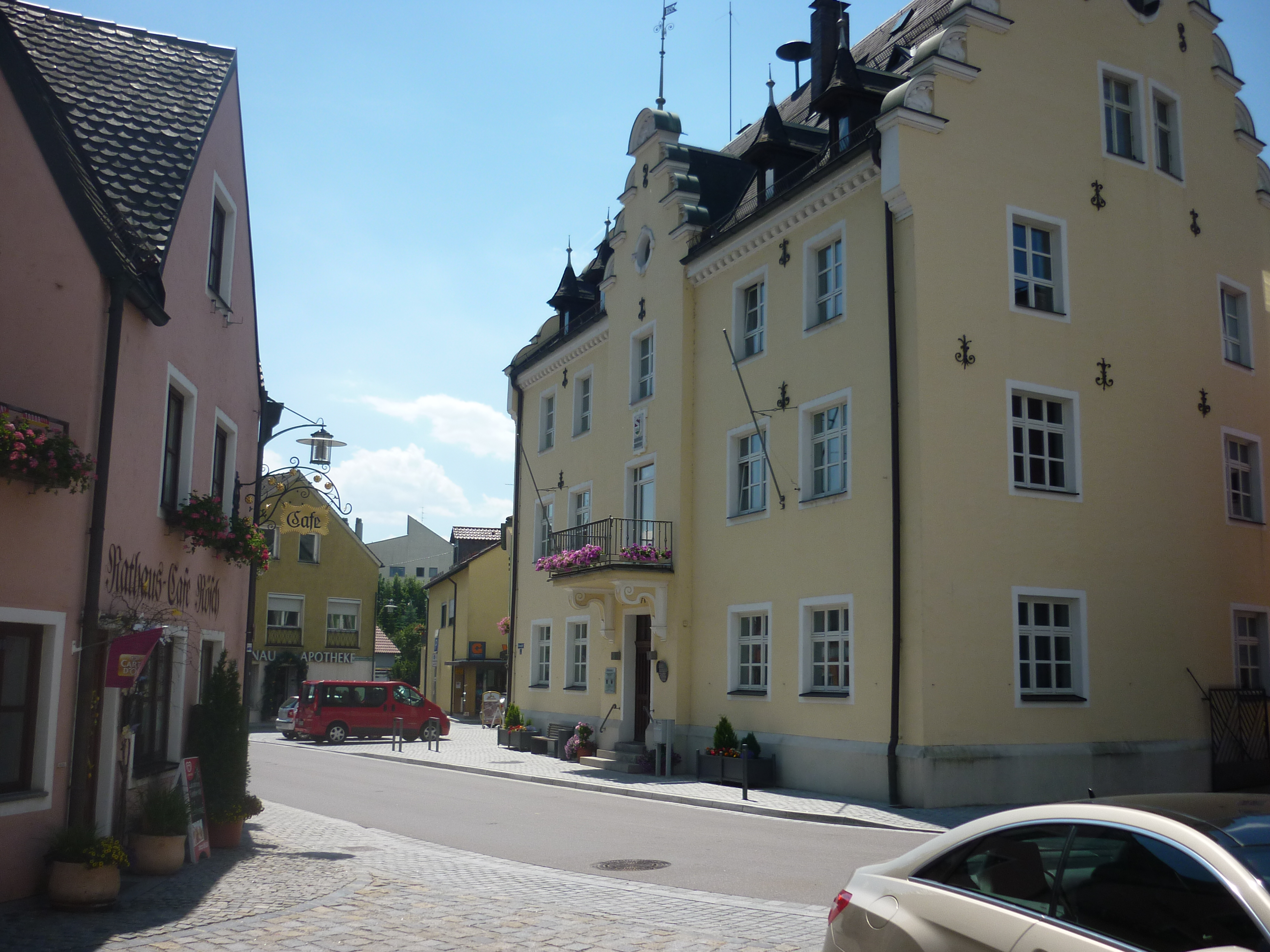 Rathausplatz Wörth an der Donau